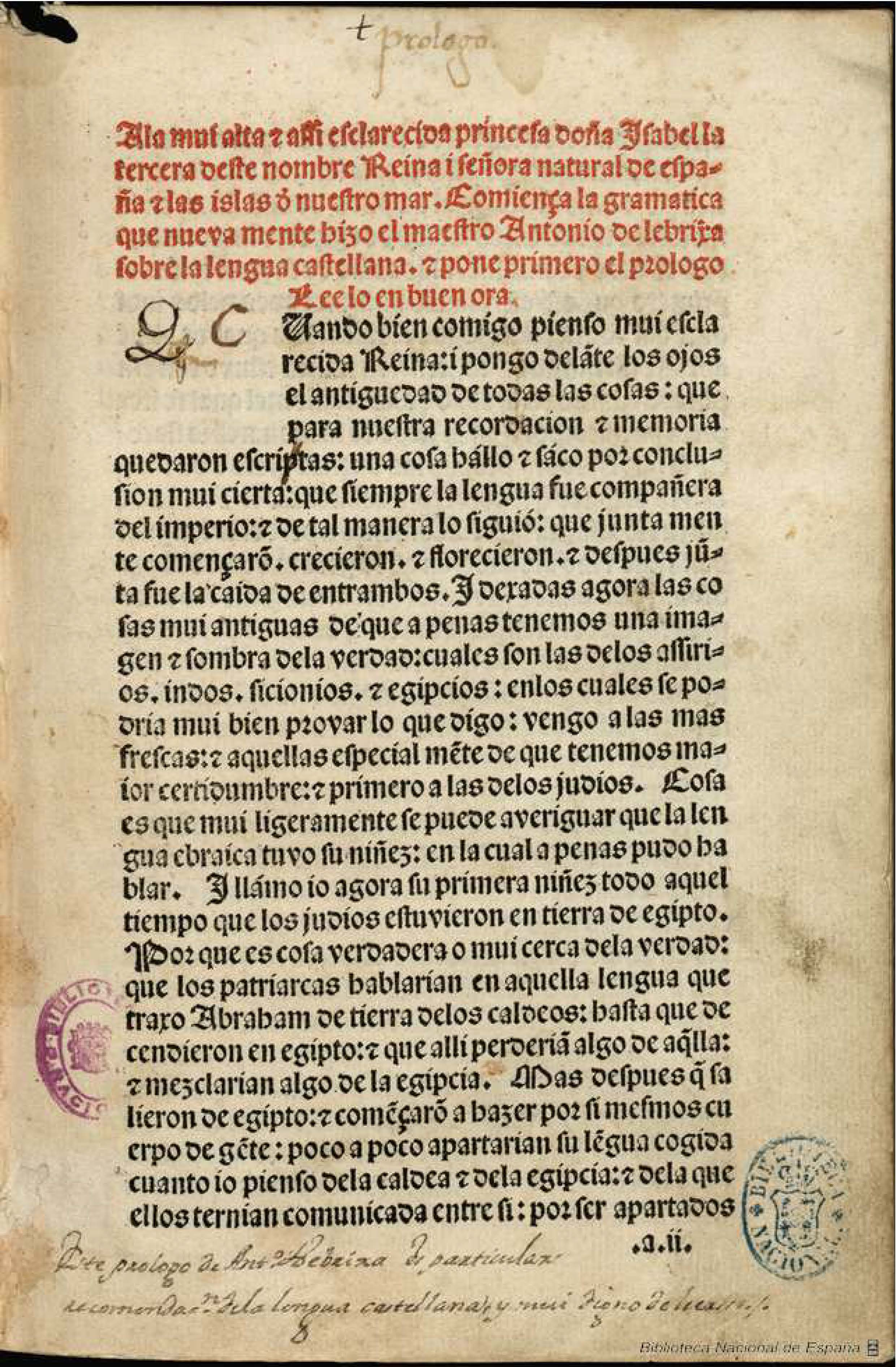 Gramática castellana [Texto impreso]. - Salamanca : [Tip. epónima], 18 agosto, 1492. - h. ; 4º. Signatura Inc/2142